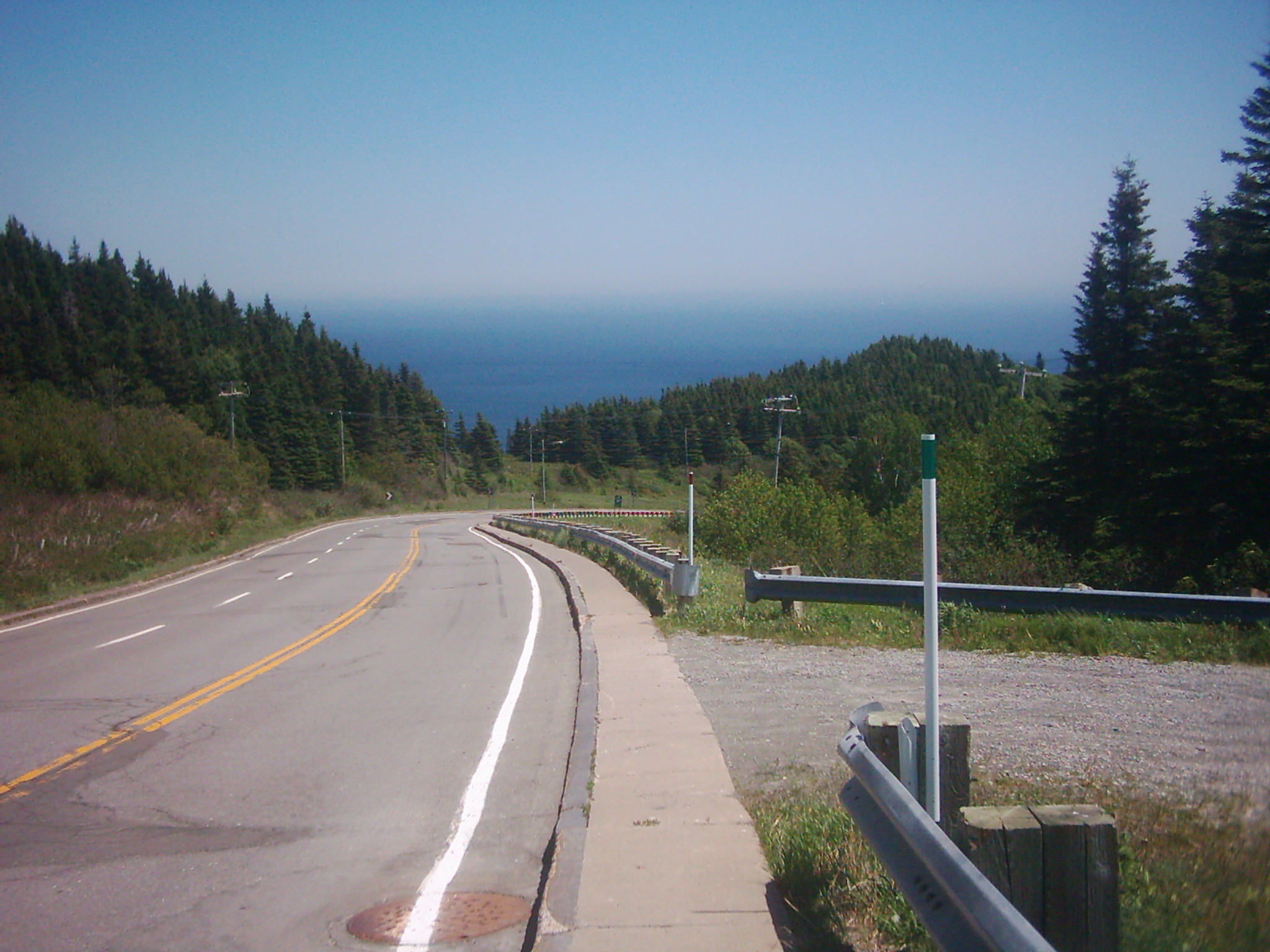 Quebec Route 132 towards Gaspésie, Canada